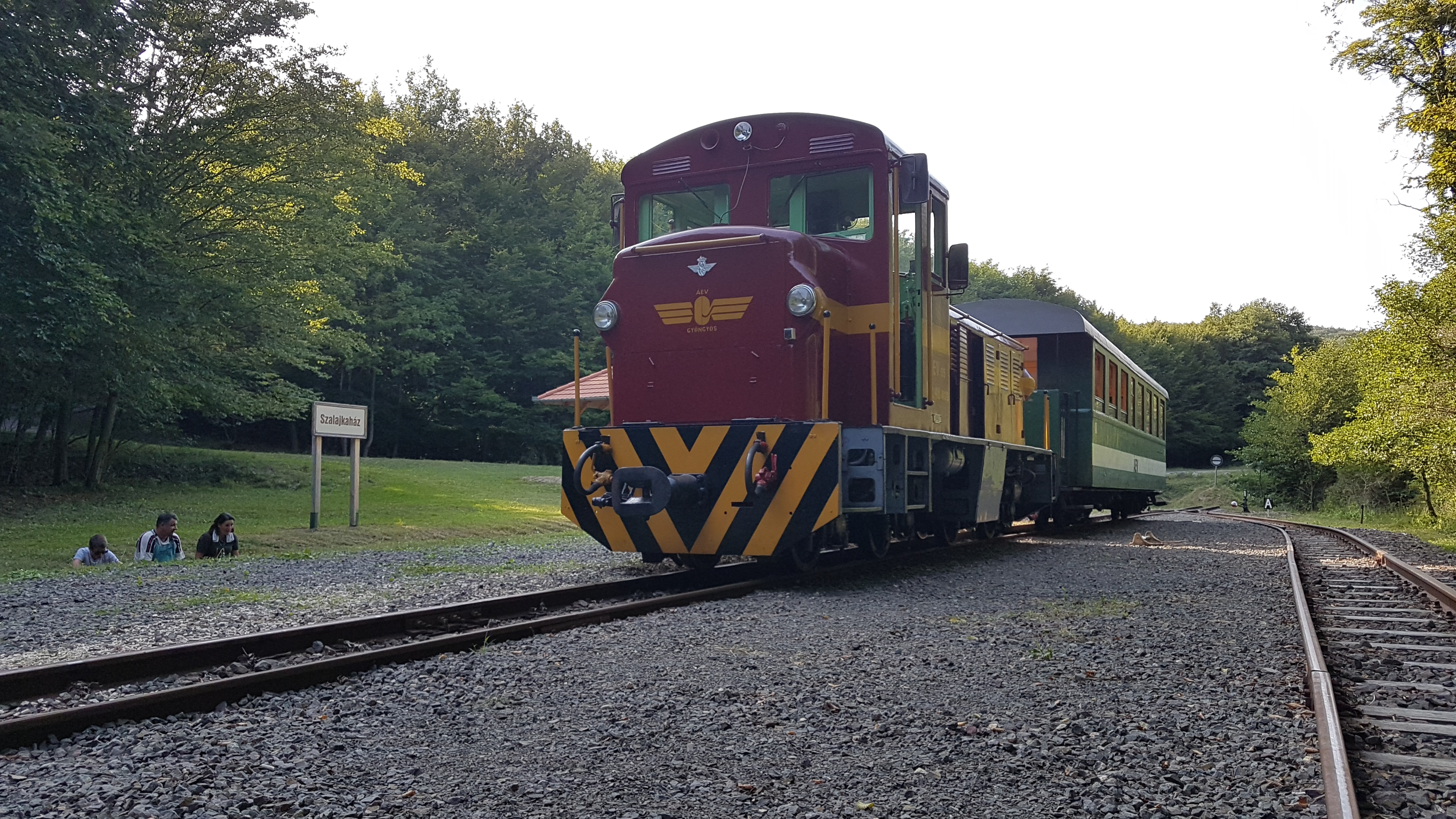 A Mátravasút Szalajkaházi végállomása.